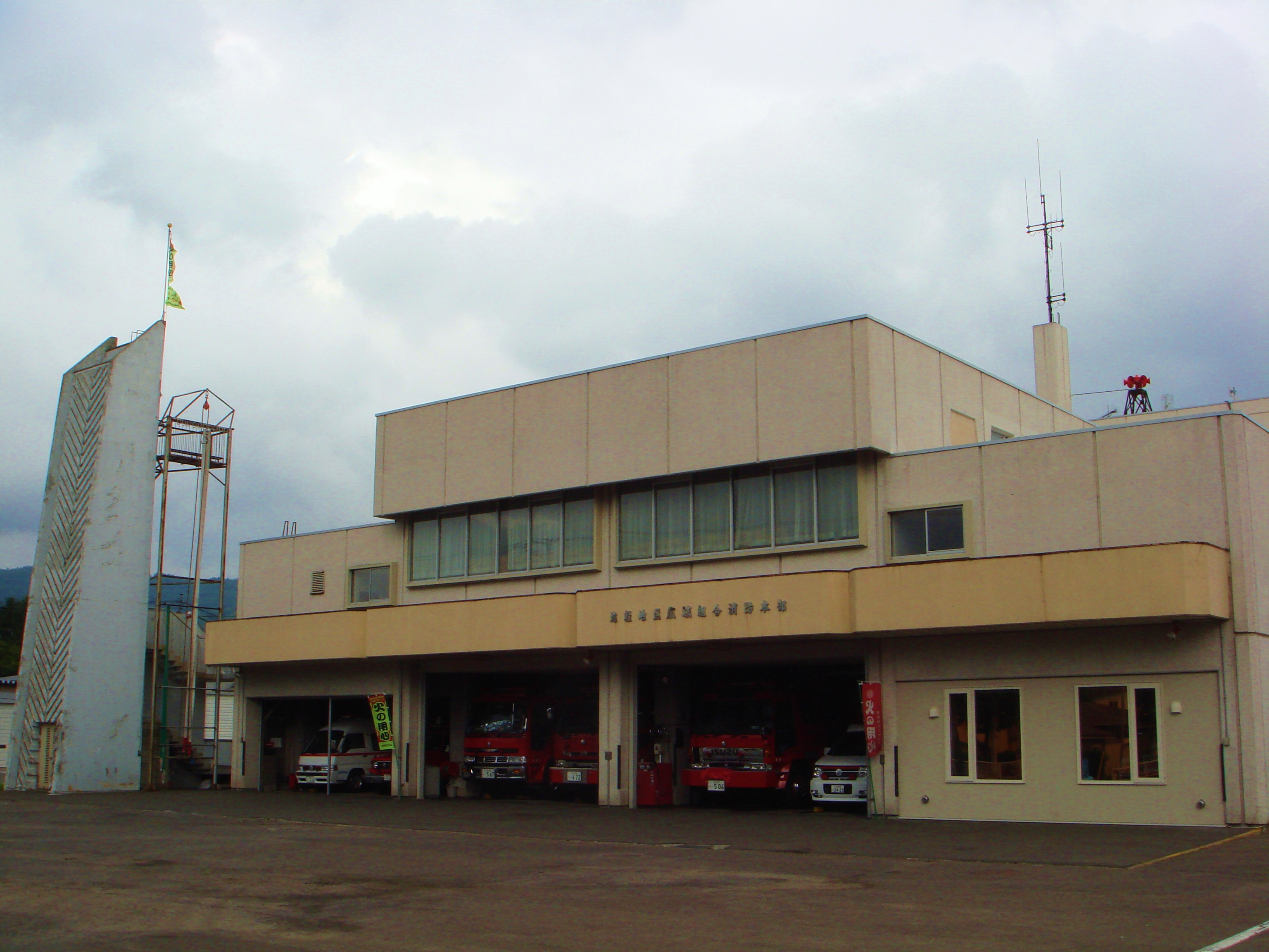 遠軽地区広域組合消防本部